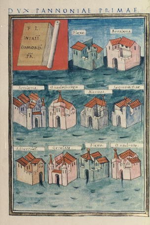 Dux Pannoniae primae et Norici ripensis from Notitia dignitatum